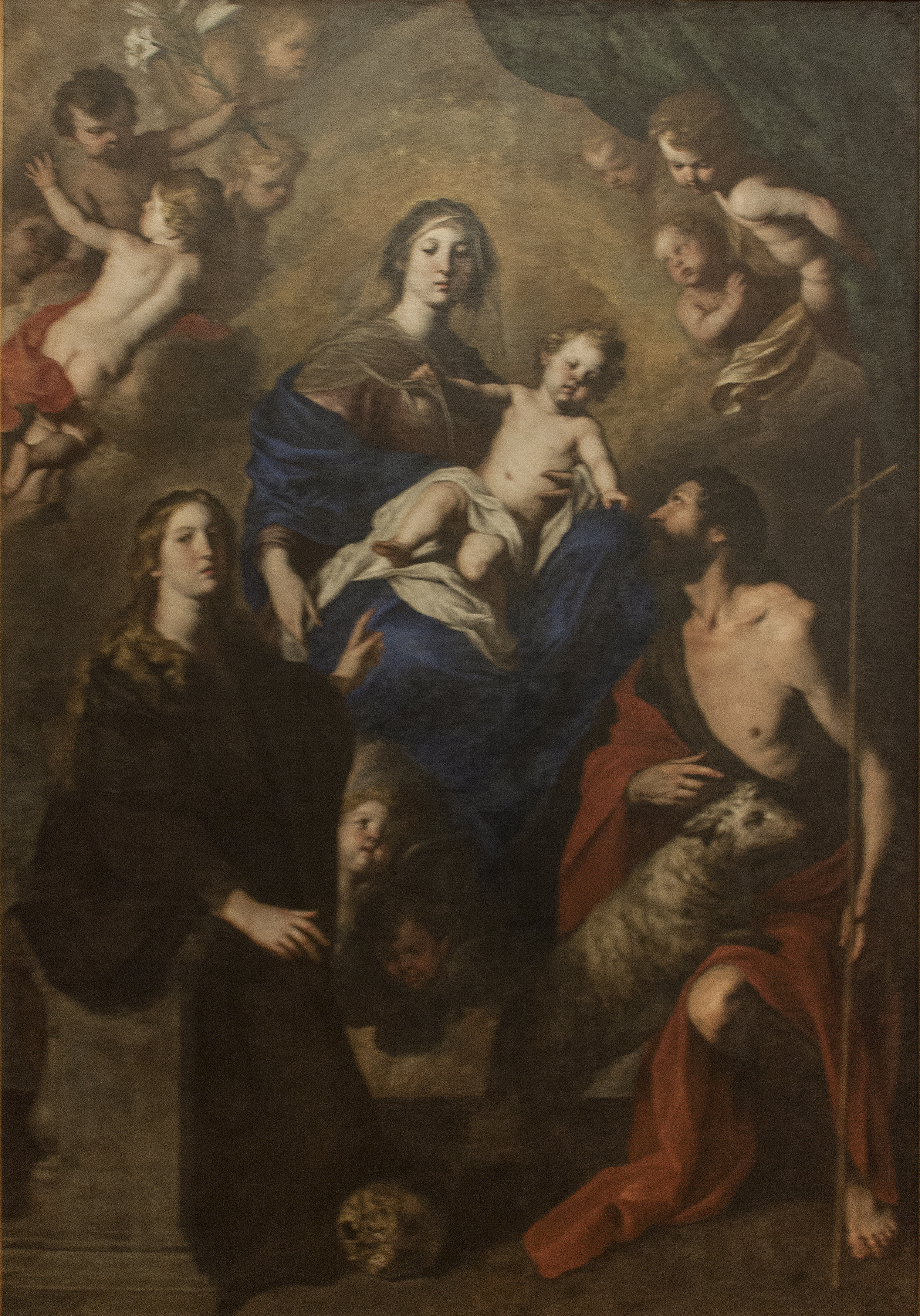 La Madonna col bambino e i Santi Rosalia e Giovanni Battista - Pietro Novelli olio su tela 259x174,5 cm Proveniente da oratorio di santa Maria delle Grazie a Ponticello, Palermo